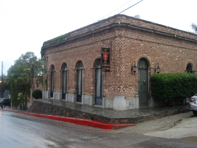 Todos Santos Inn